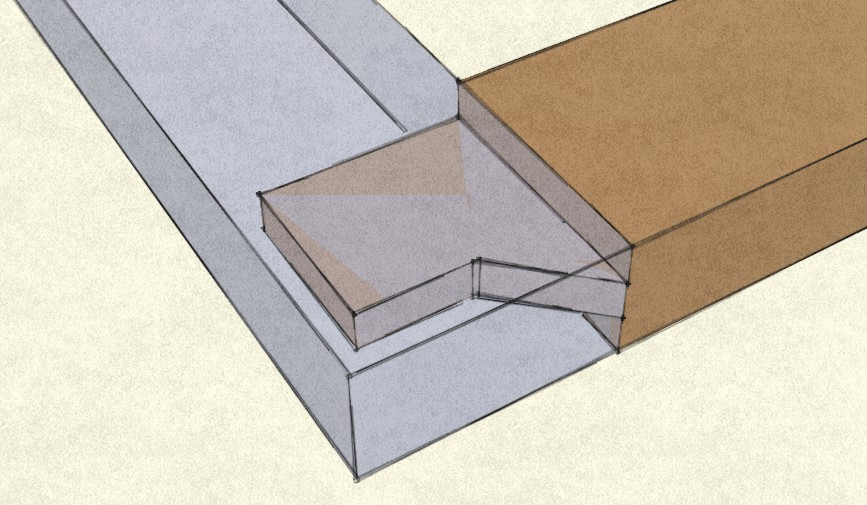 Fészkes szakállas vésett csap ferde szakállal